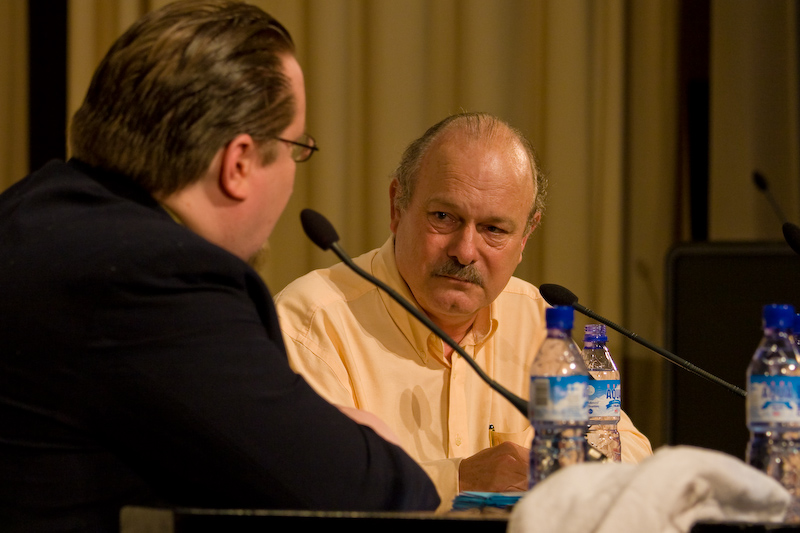 Joe Haldeman at Finncon 2007 in Jyväskylä, Finland - July 2007